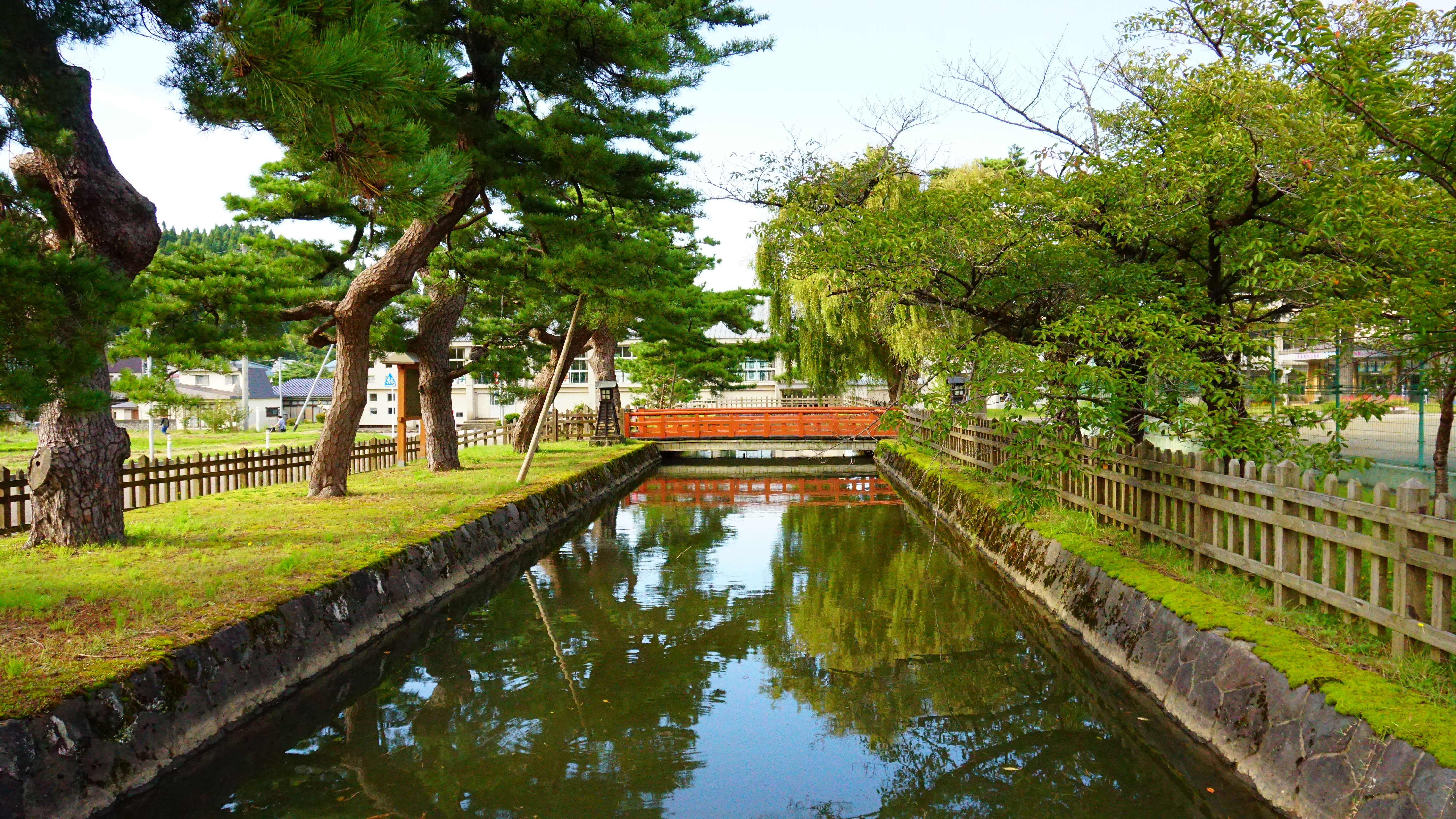 旧矢島藩庁が置かれた八森陣屋（矢島陣屋）の堀。陣屋の跡地は由利本荘市矢島小学校となっている。